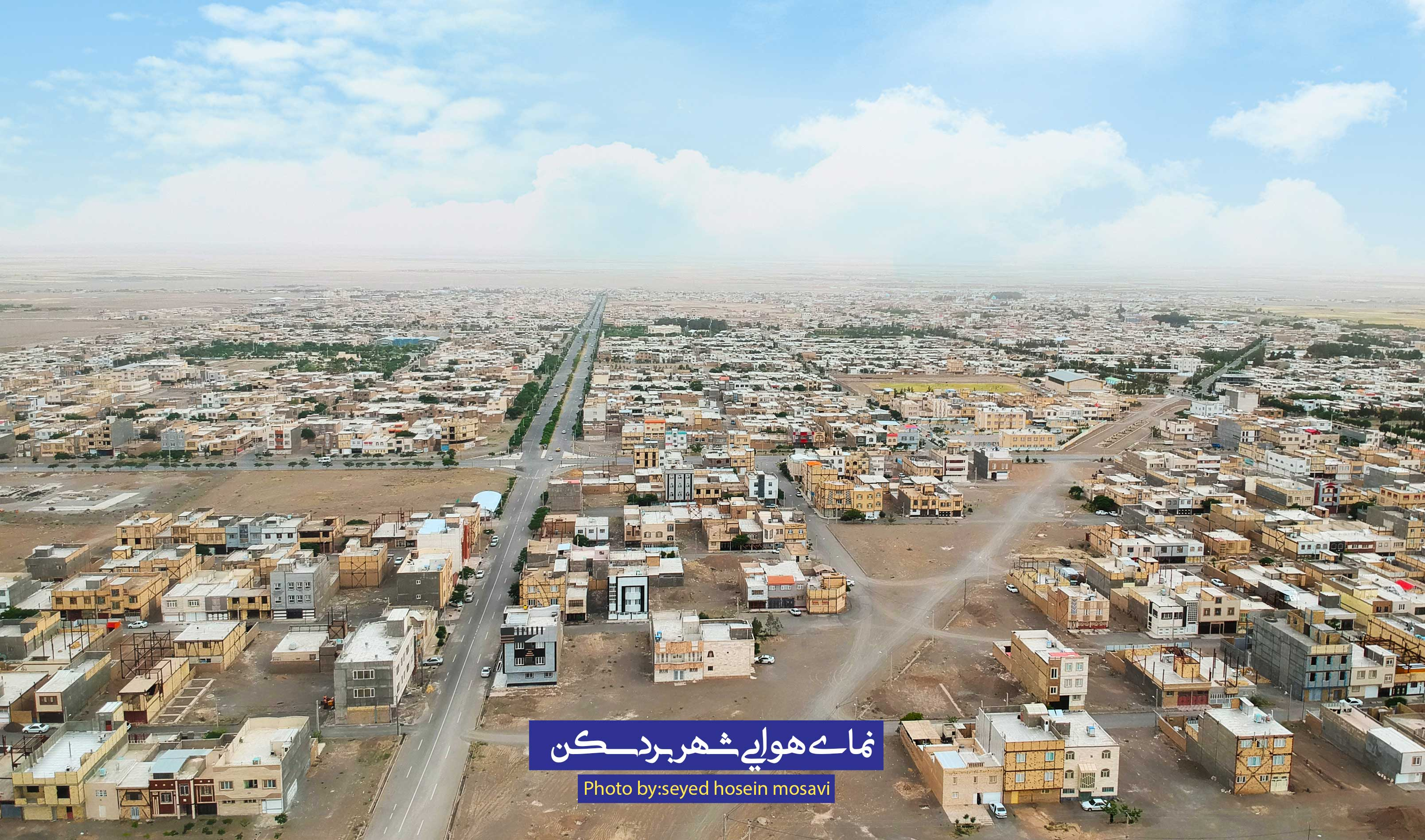 نمای هوایی شهر بردسکن